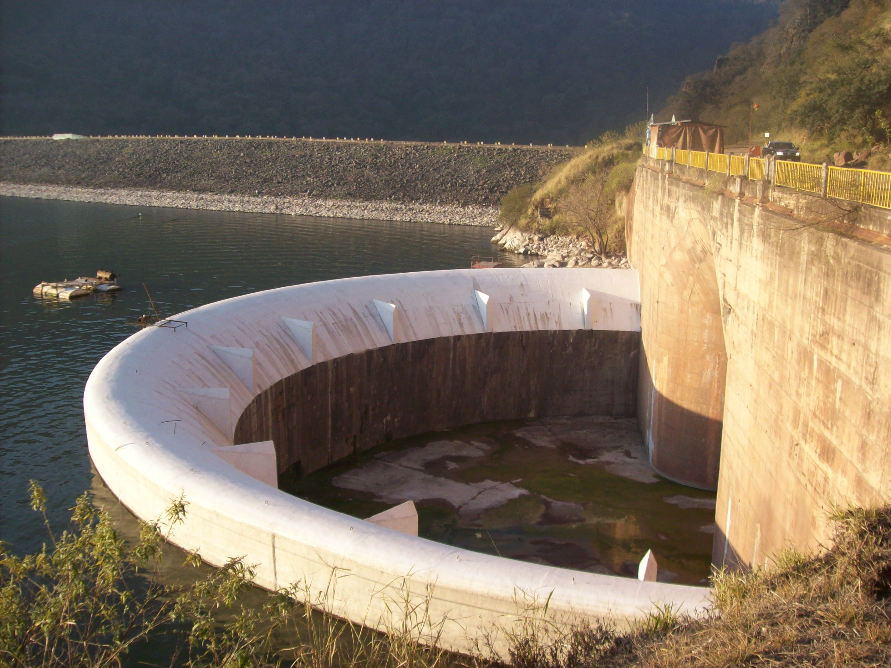 Embudo o vertedero del Dique Celestino Gelsi, en El Cadillal, provincia de Tucumán, Argentina.